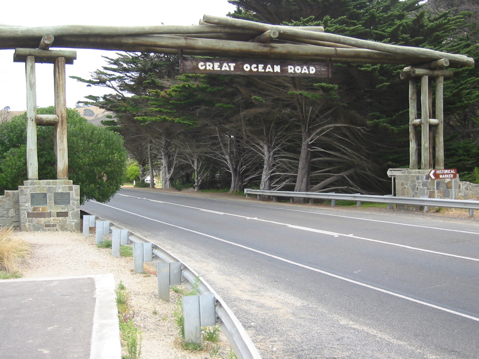 Start der Great Ocean Road